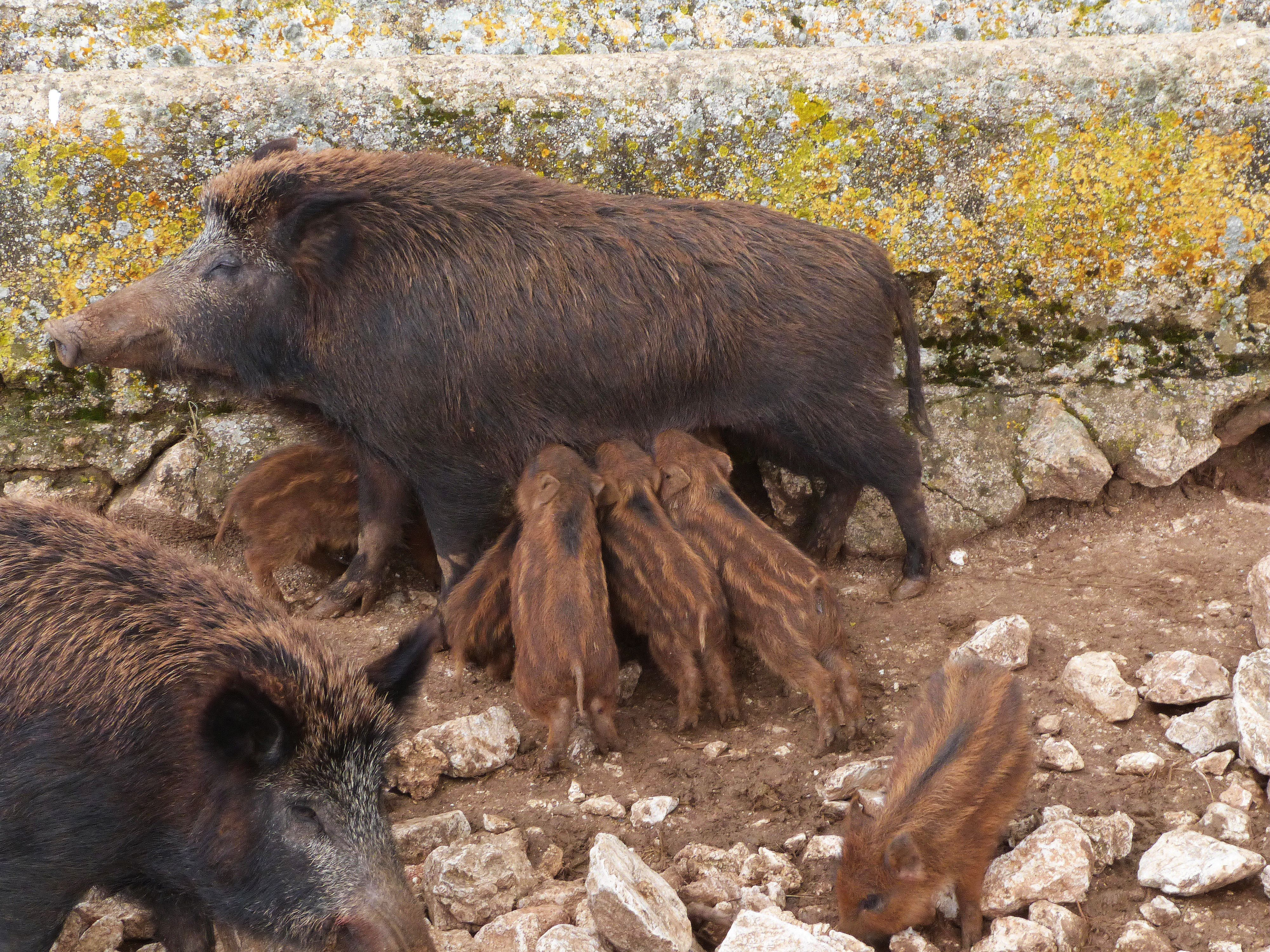 Schweine bei Ságana